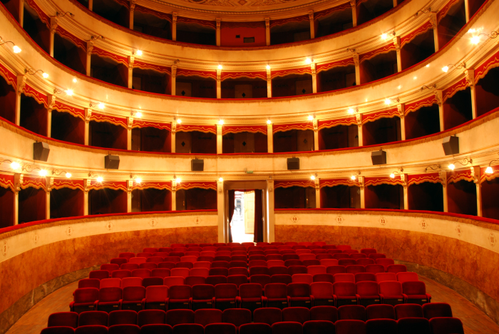 Sansepolcro, Cinema Teatro Dante, Vista dall'interno spalle al palcoscenico